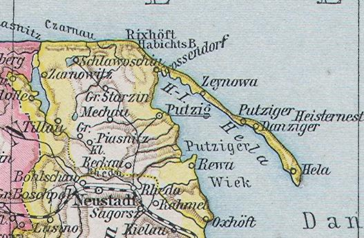 Kreis Putzig, Ausschnitt aus